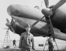 キ74試作遠距離偵察爆撃機を米軍に引き渡し準備中の田中次郎氏。